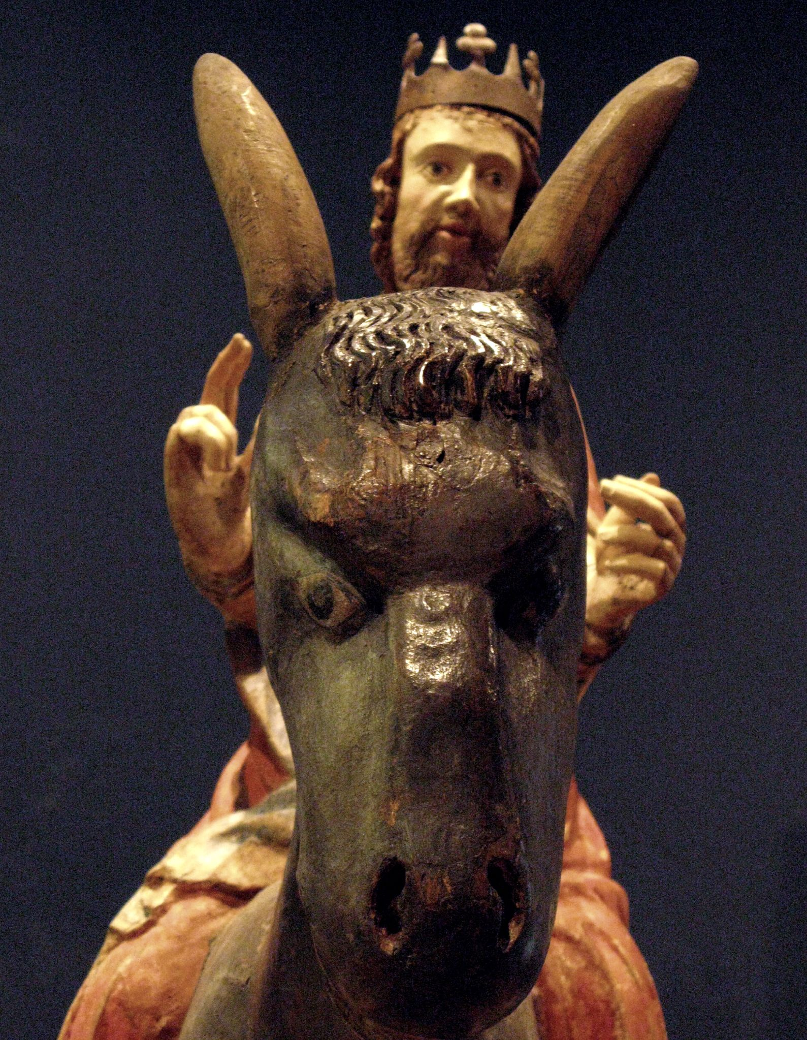 Zuid-Duitsland, Palmezel met Christus, 0382 Palmezel met Christus, Zuid-Duitsland, 1ste helft 14de eeuw